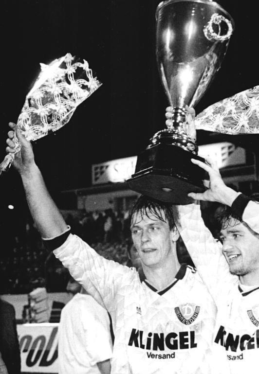 ADN- Matthias Hiekel-27.11.90-Dresden: Fußball-Deutschland-Cup- FC Dynamo Dresden - FC Bayern München 1:0 (0:0) Jubel bei den Dresdnern Andreas Wagenhaus (l.) und Mario Kern über den Gewinn des Pokals am 26.11.1990.